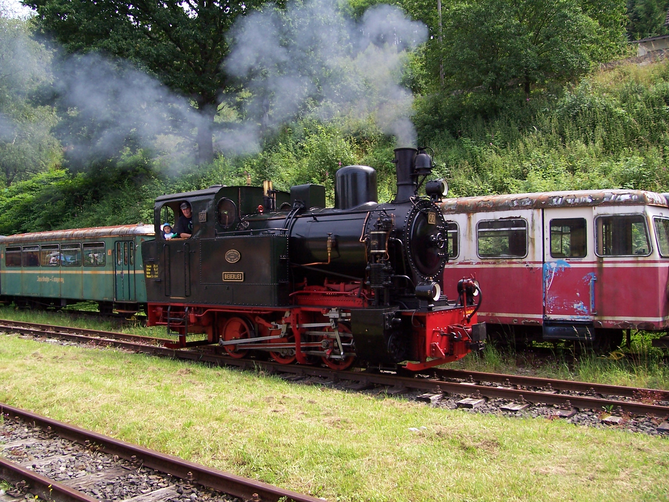 Die Bieberlies am 14.07.2007